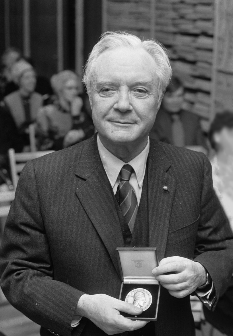 Felix de Nobel (ex-dirigent Nederlands Kamerkoor) met medaille van de stad Amsterdam